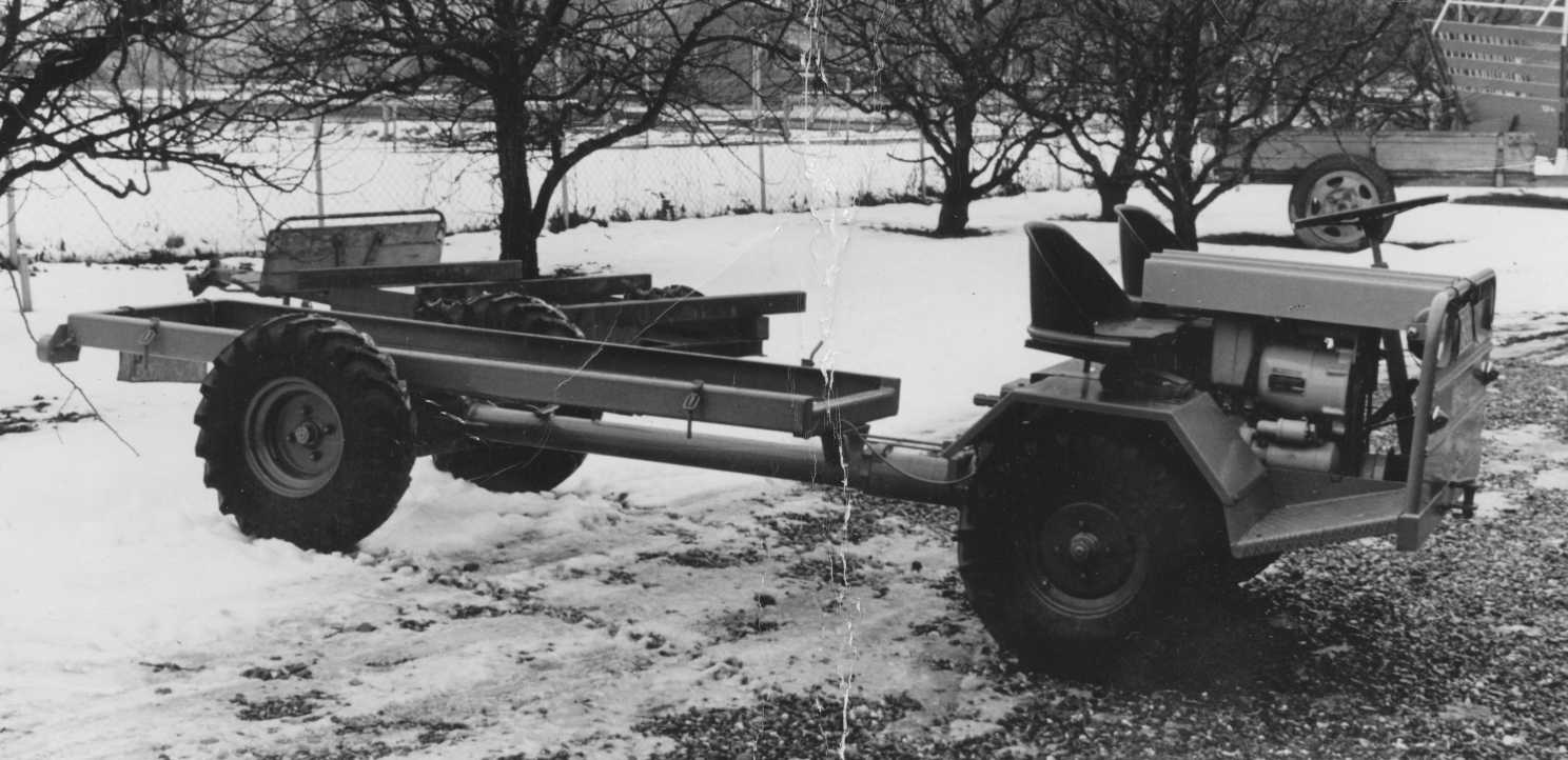 Schilter TR 1500 ohne Aufbau.